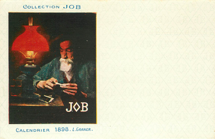 carte postale de la Collection JOB reproduction du calendrier de 1898 par Luis Graner